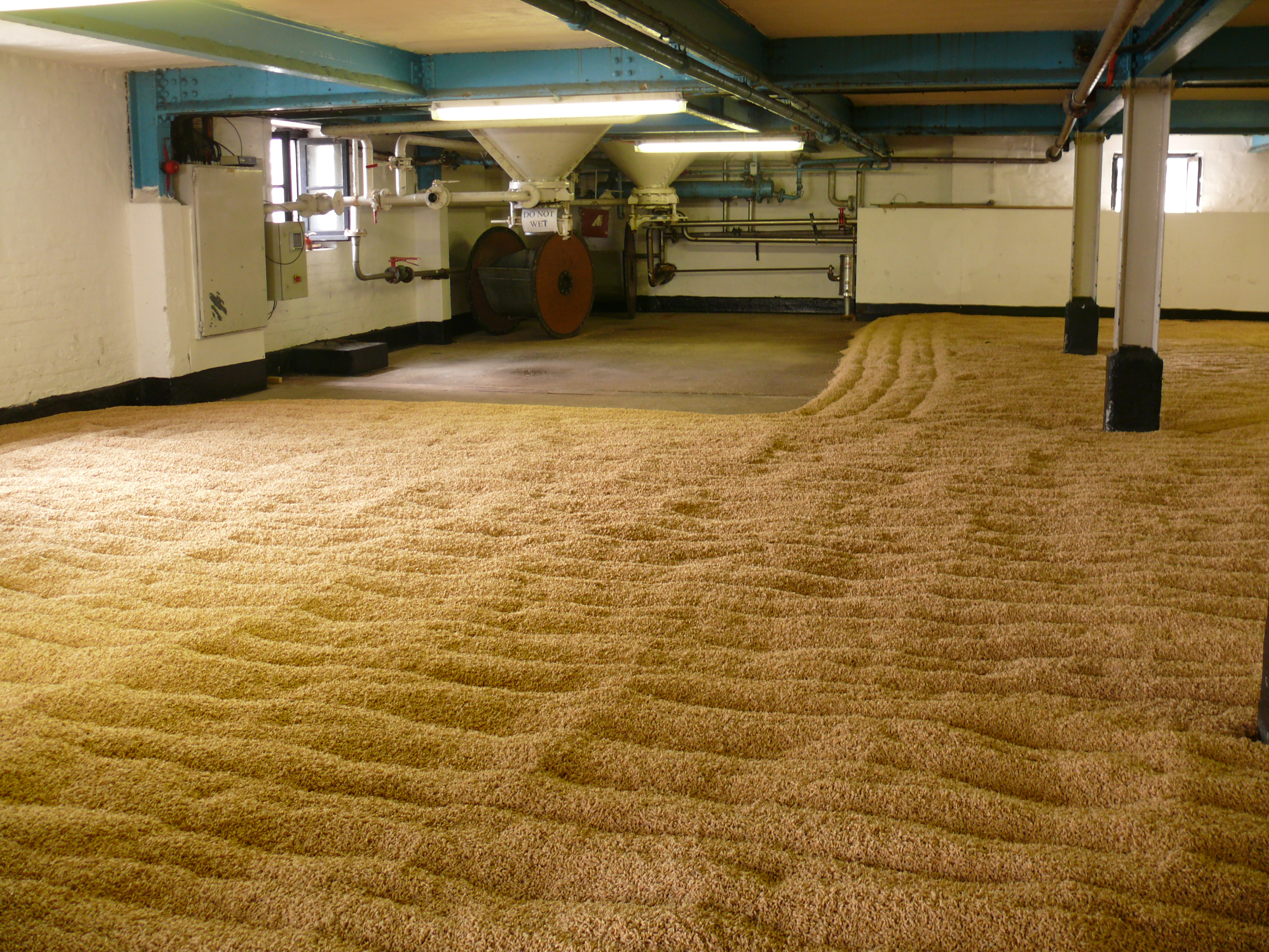 Malt en germination à la distillerie Bowmore